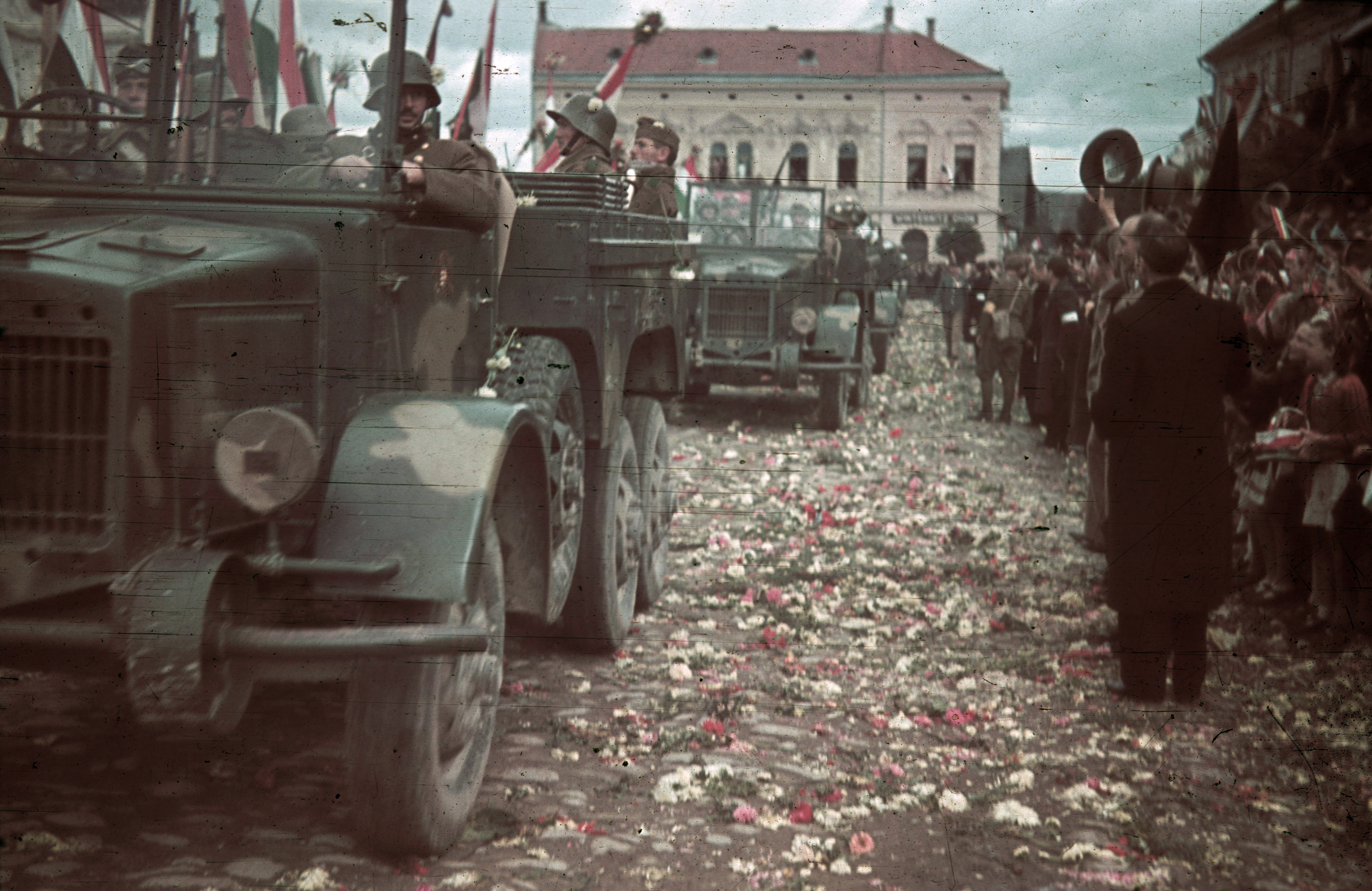 Kézdivásárhely, Gábor Áron tér a magyar csapatok bevonulása idején, szemben a Malom utca. A felvétel 1940. szeptember 13-án készült Location: Romania, Transylvania, Targu Secuiesc Tags: colorful, commercial vehicle, military, Rába-brand Title: Gábor Áron tér a magyar csapatok bevonulása idején, szemben a Malom utca. A felvétel 1940. szeptember 13-án készült